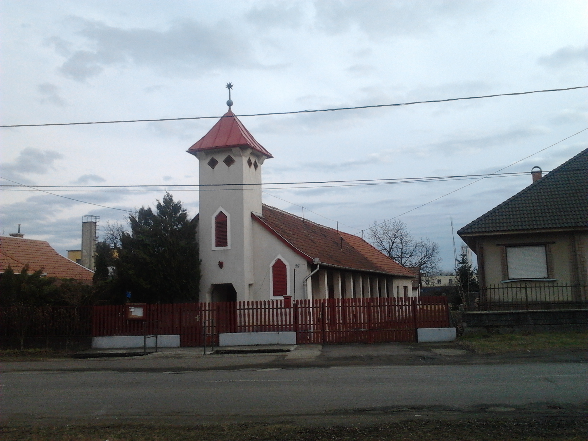 A füzesabonyi református közösség imaháza.